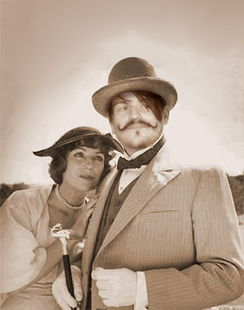 Portret Tobića Tobića Idola Mladih